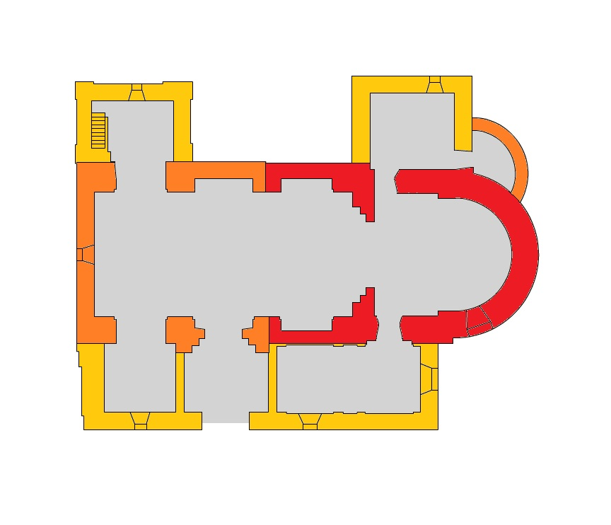 Planta de la Iglesia mostrando en diferentes colores los diferentes estilos y épocas a los que pertenece cada parte